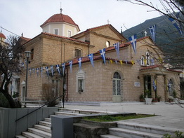 Ο Ιερός Ναός Αγίων Θεοδώρων στην κεντρική πλατεία της Αταλάντης